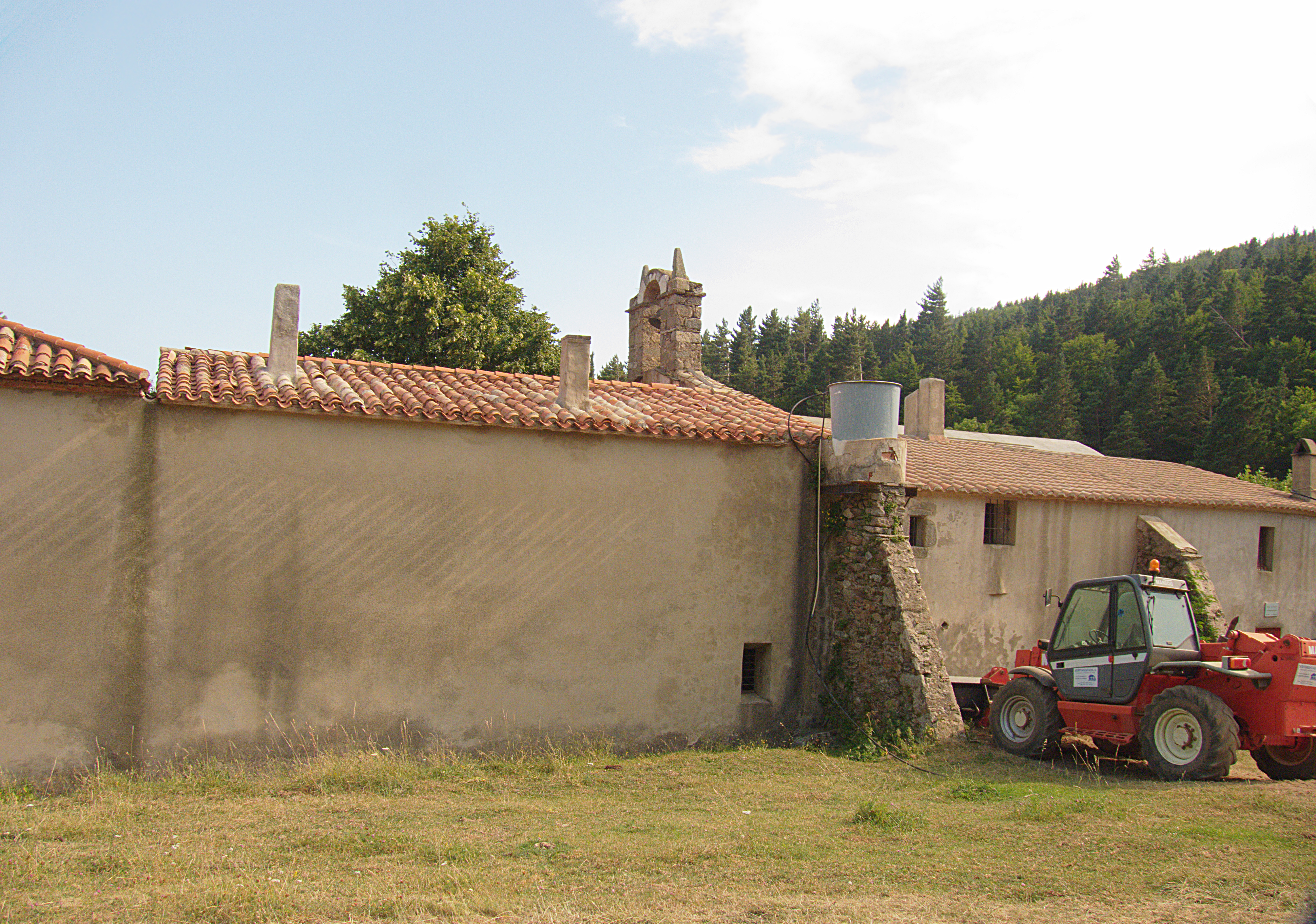 Notre-Dame des Salines, Maçanet de Cabrenys (Haut-Ampurdan, Gérone, Catalogne, Espagne), Reynès (Pyrénées-Orientales, Languedoc-Roussillon, France)